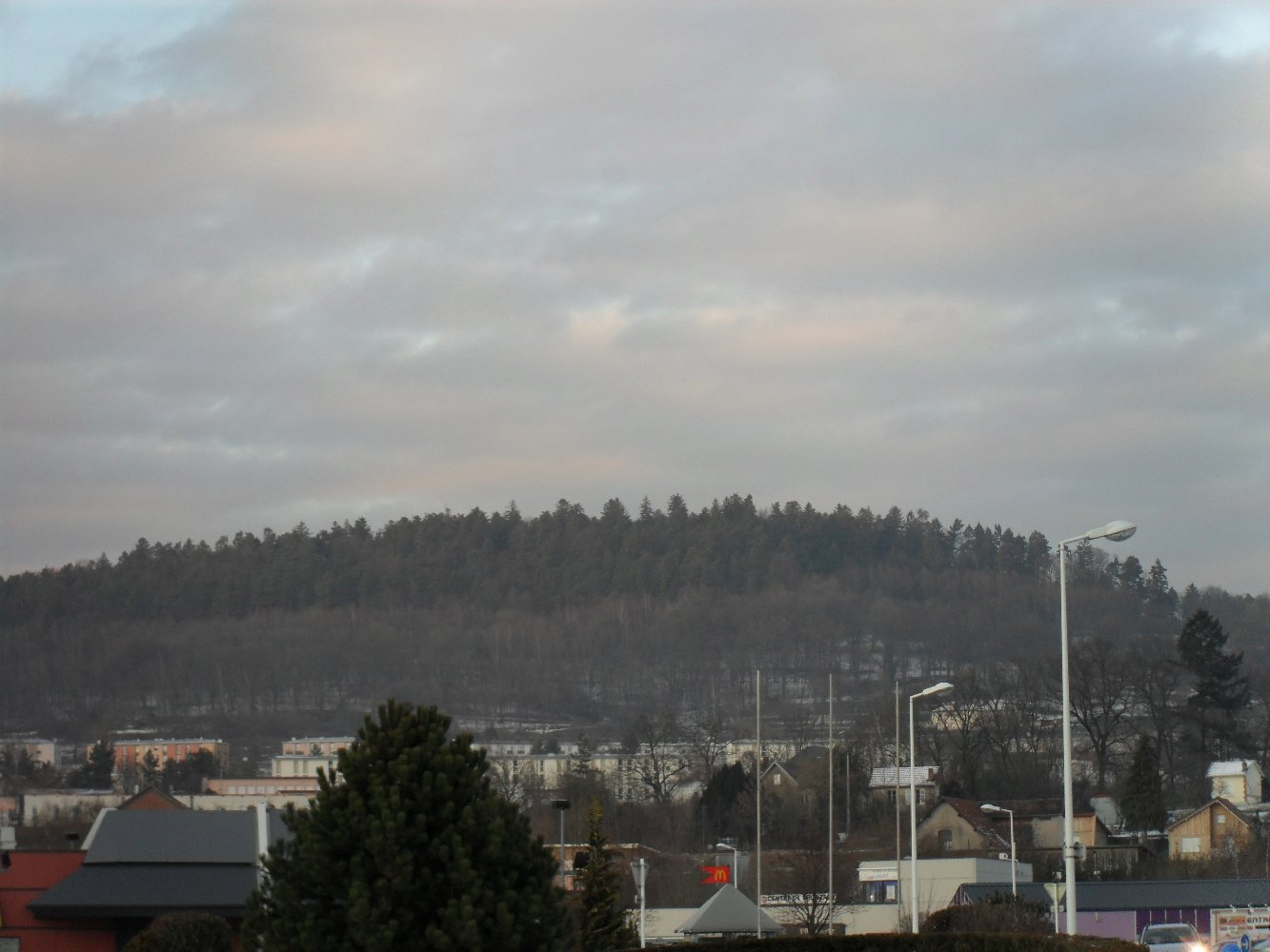 Photographie de l'Ortimont depuis le premier rond-point de la Zone marchande d'Hellieule, Saint-Dié. Image simplement réduite en pixel.